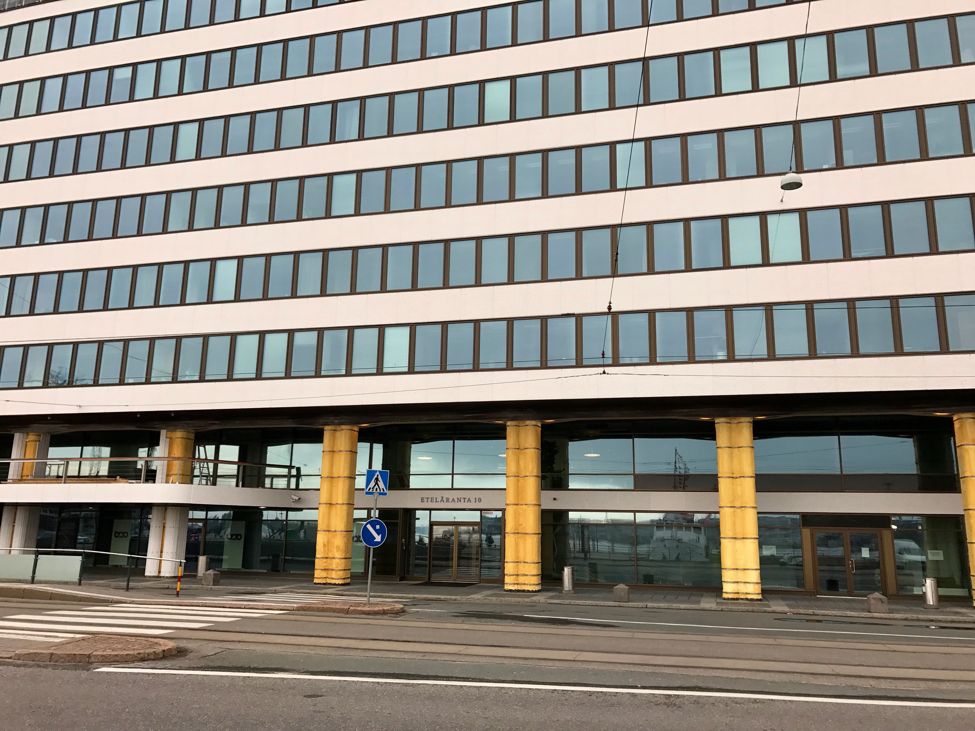 Eteläranta 10 on yksi Helsingin vilkkaimmista ja tärkeimmistä neuvottelukeskuksista. Kuvassa rakennuksen sisäänkäynti.